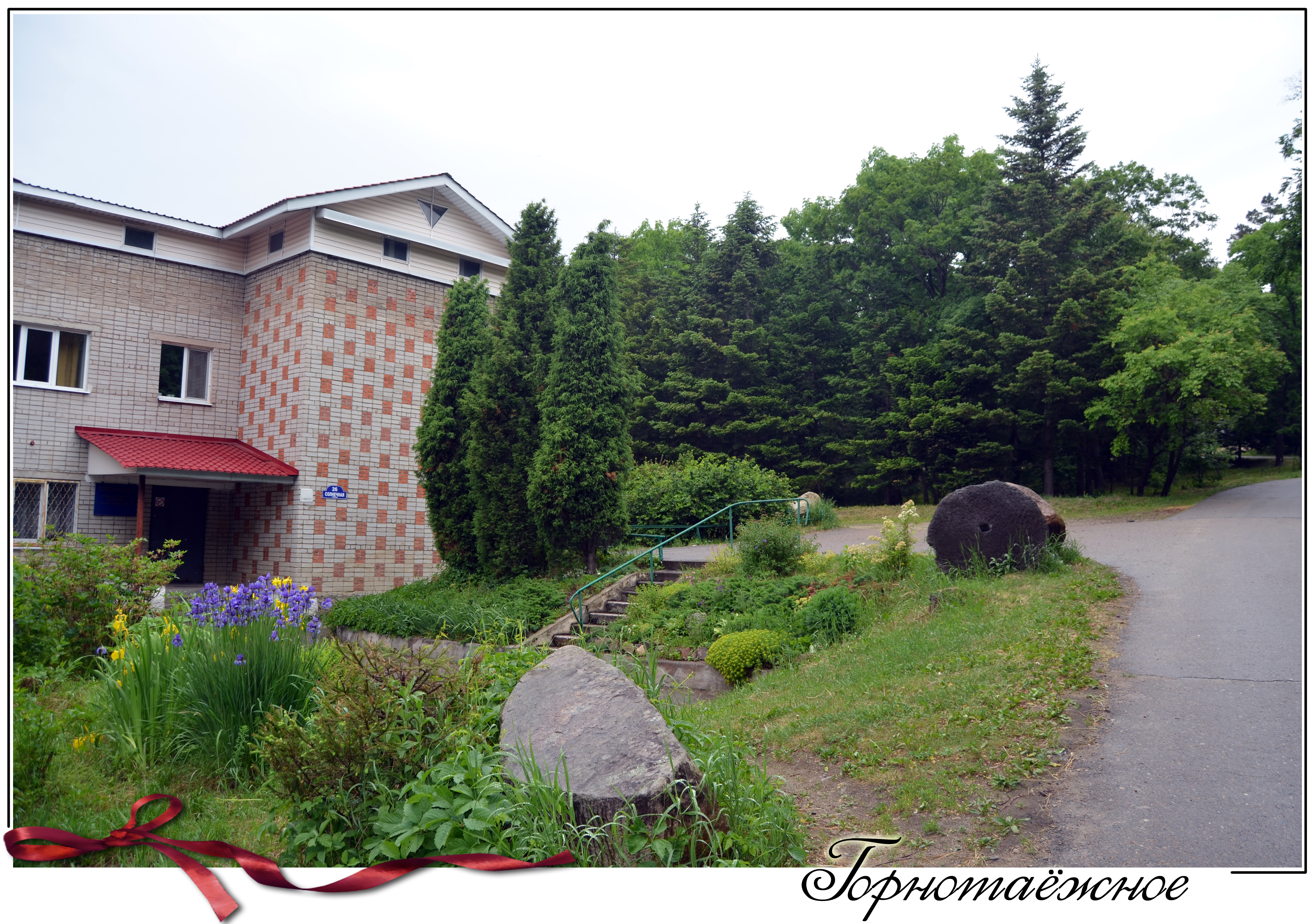 Улица в селе.